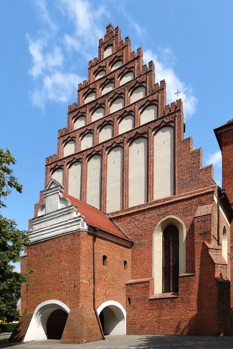 Katedra p.w. św. Marcina i Mikołaja w Bydgoszczy